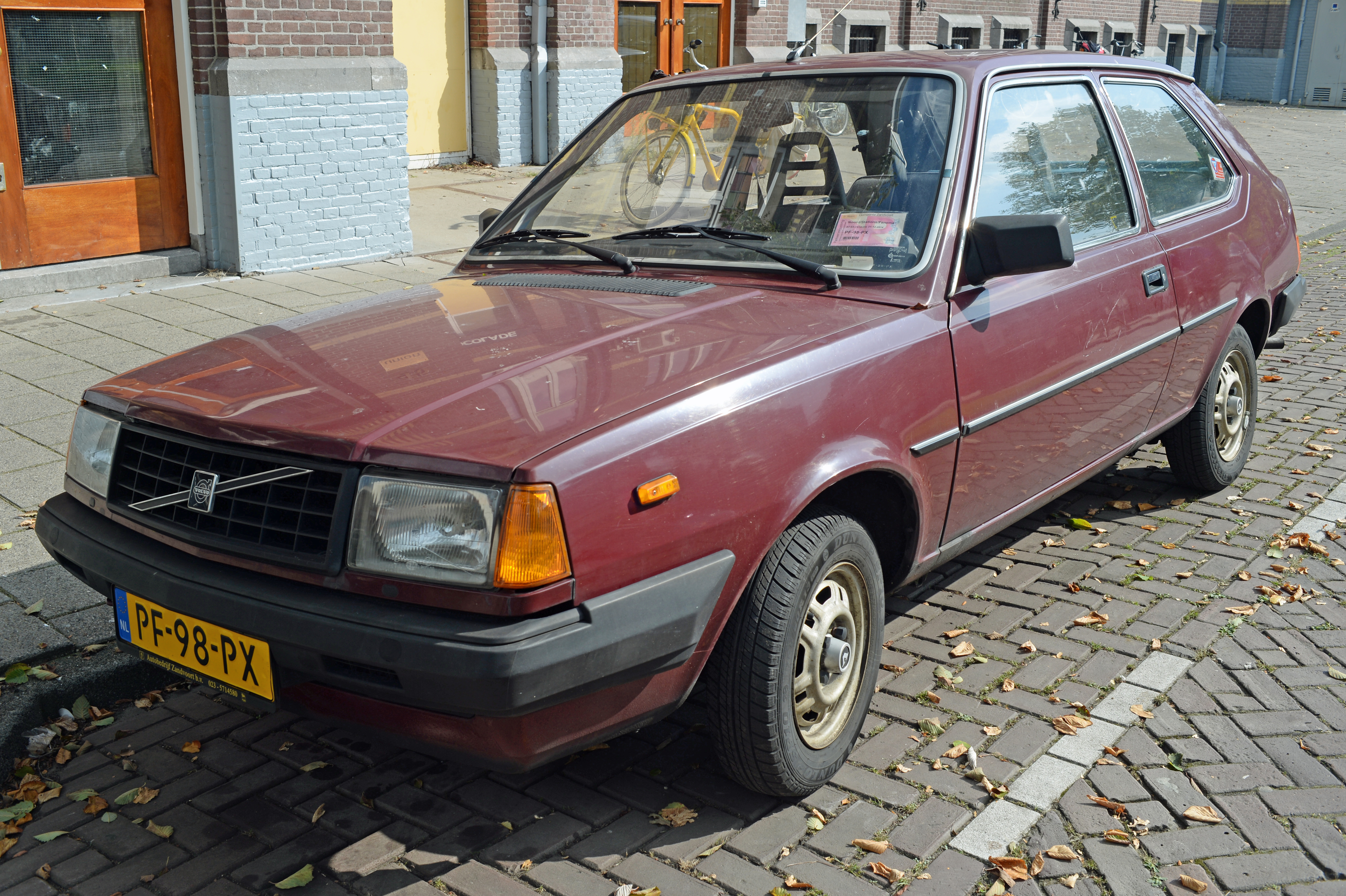 1986 Volvo 340 DL